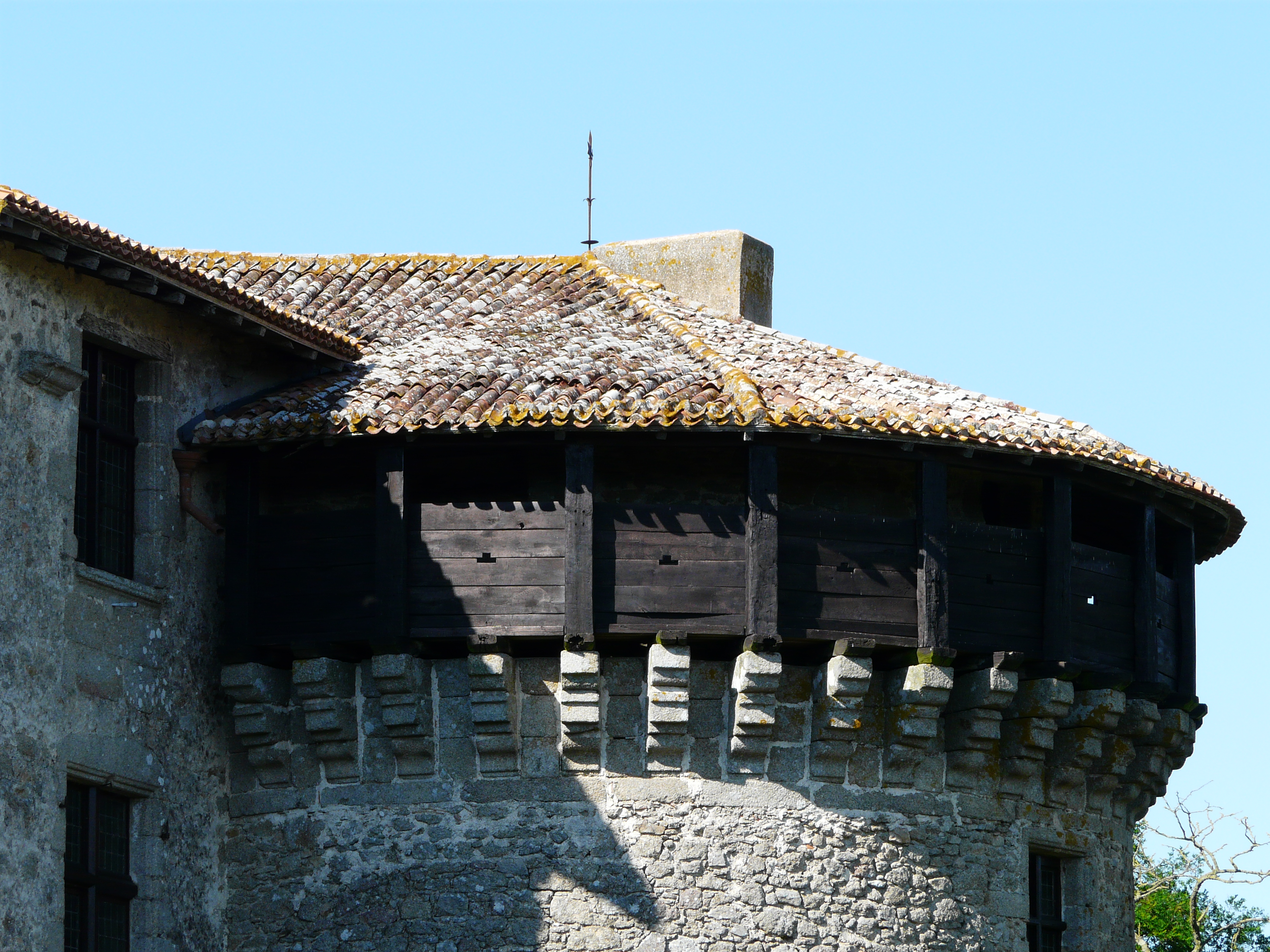 Chemin de ronde, château de Tennessus, Amailloux, Deux-Sèvres, France